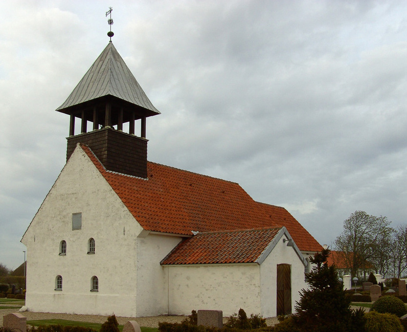 Ho kirke (jylland) fra sydvest